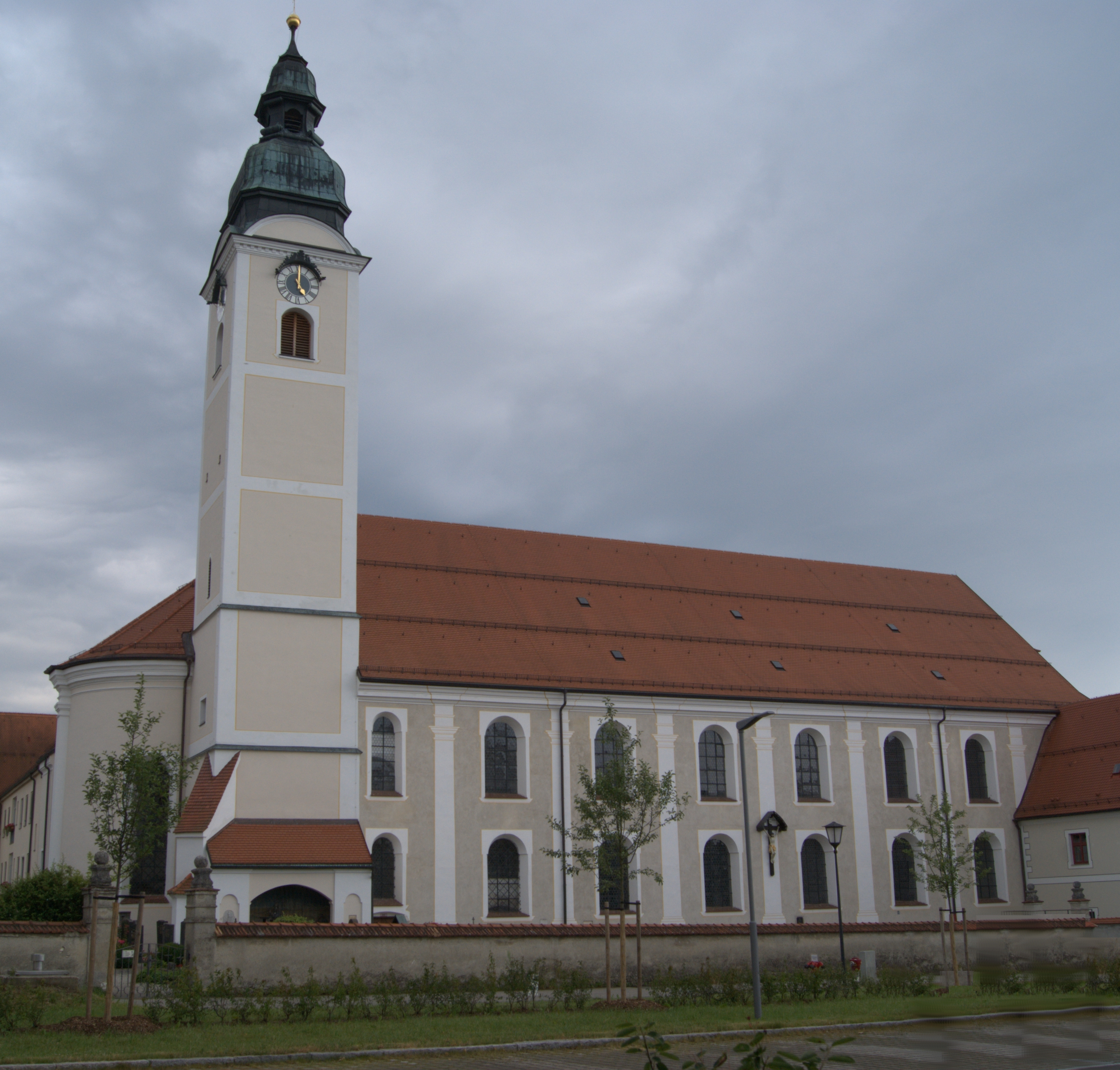 Wasserburg am Inn, Attel, ehemalige Klosterkirche